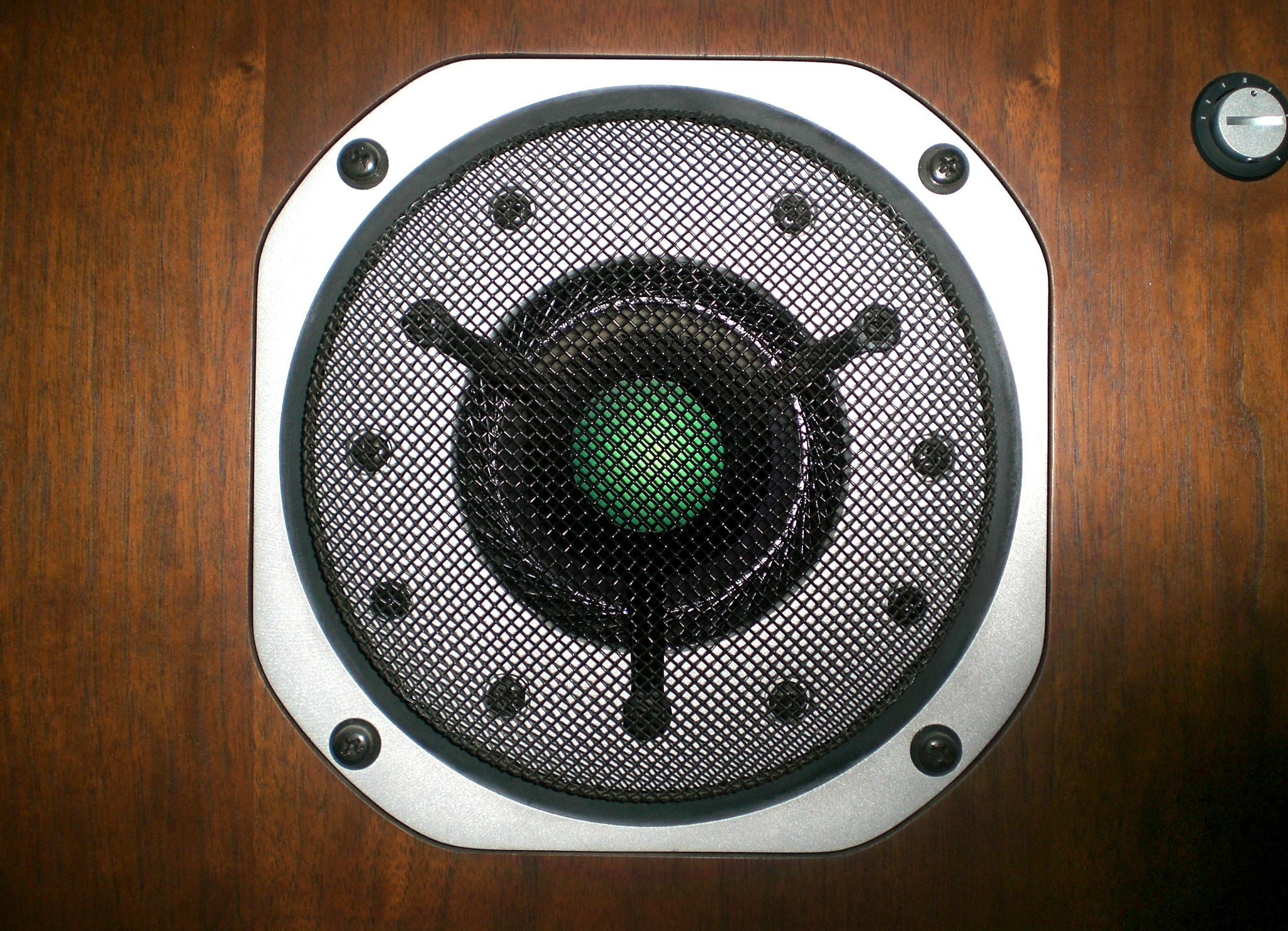 Yamaha NS-2000 Speaker, midrange.